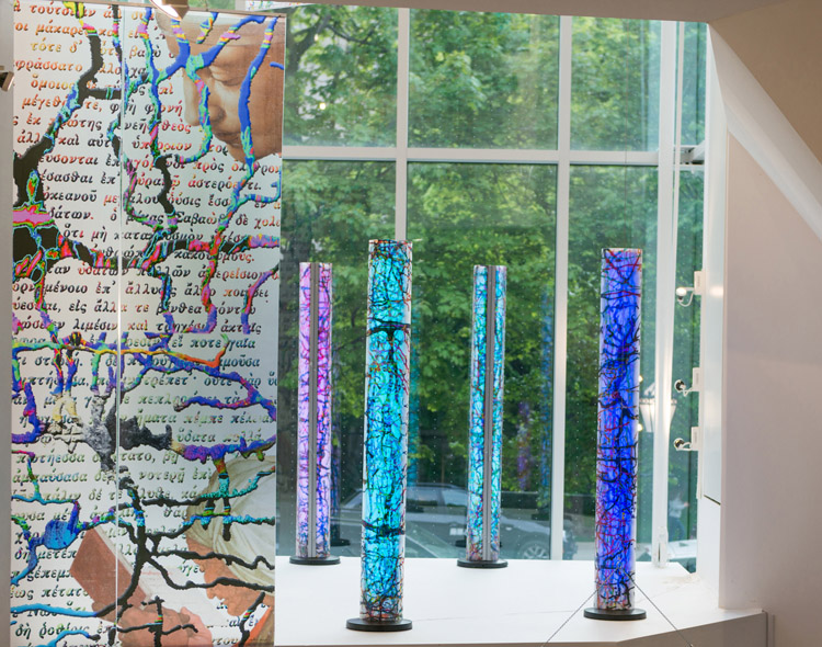 Kūrinys: Atminties ciklai